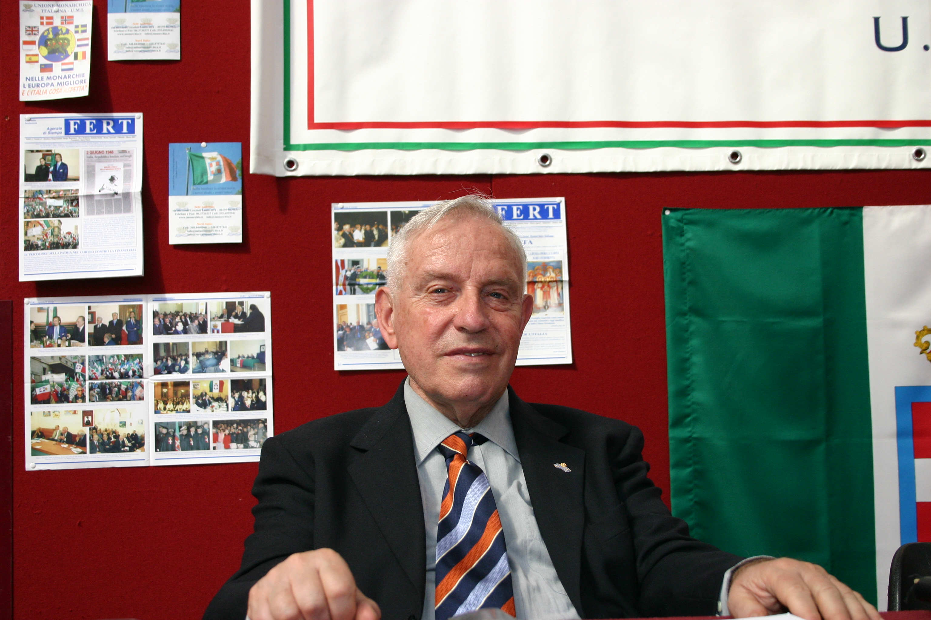 Sergio Boschiero. Foto amatoriale scattata a Milano in occasione della Fiera della Politica ed. 2007.